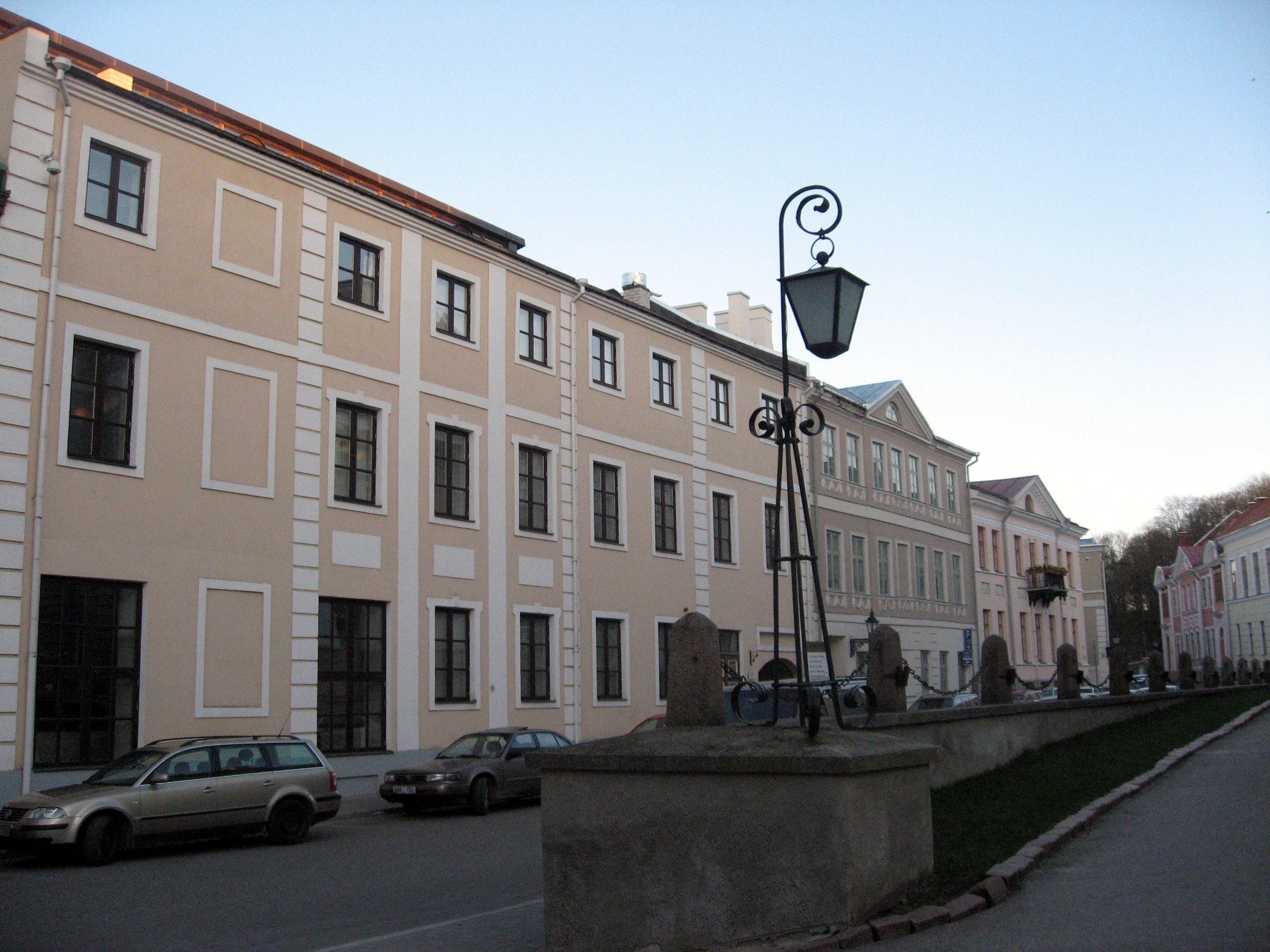 Tartu